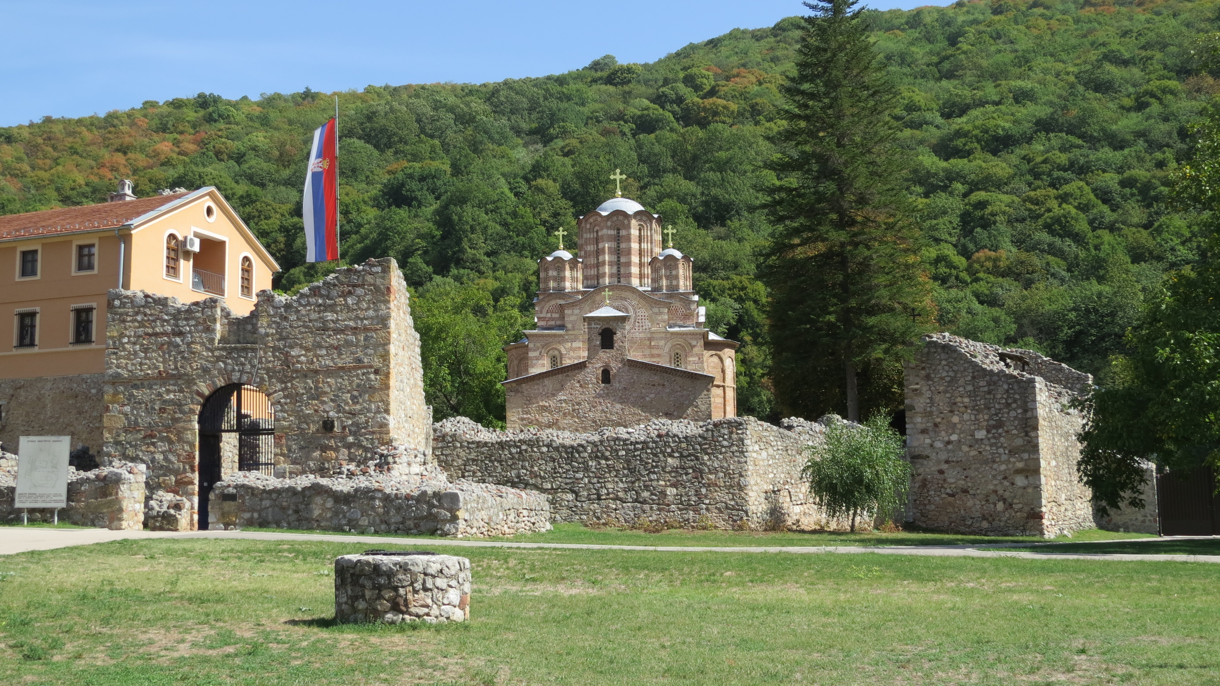 Samostan Ravanica, Ćuprija, Srbija.